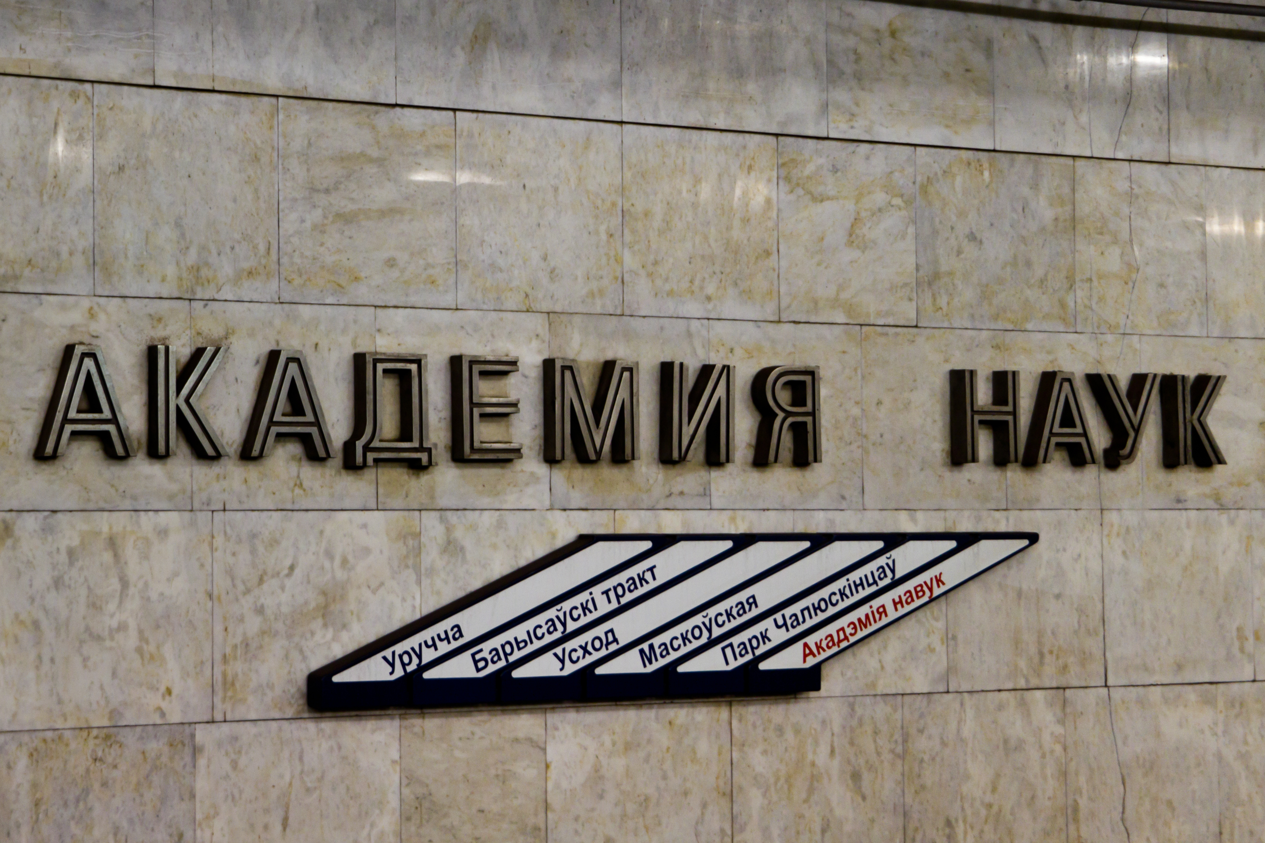 Станция метро «Академия наук», Минск